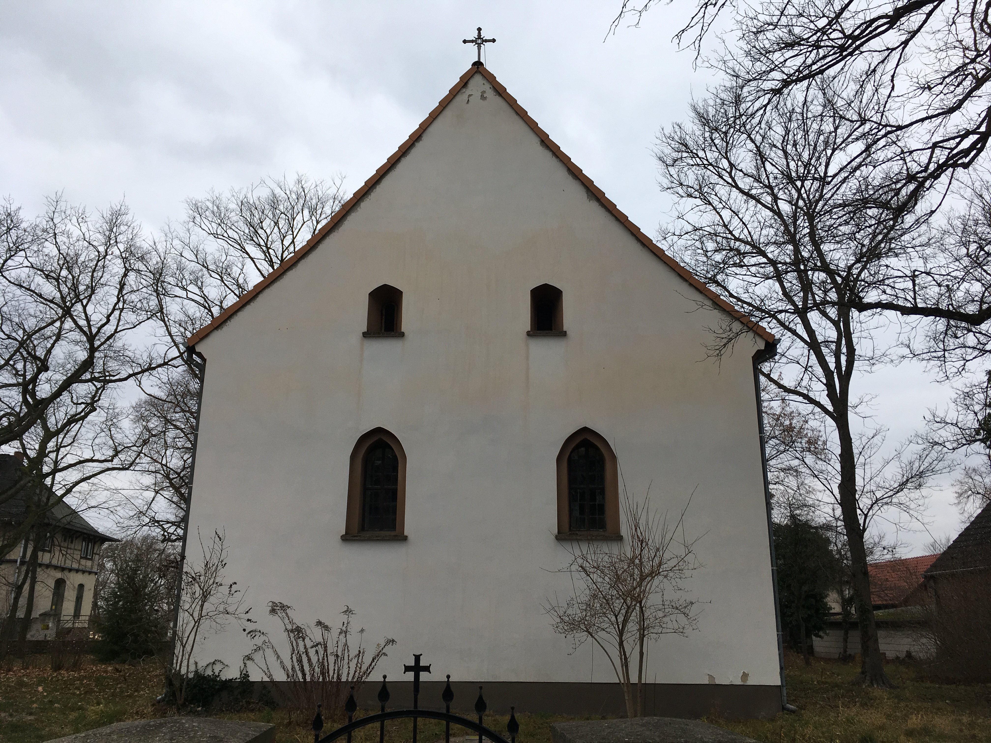 Die Dorfkirche Gräbendorf entstand vermutlich um 1350 und wurde im Dreißigjährigen Krieg zerstört. 1662 wieder aufgebaut befindet sich im Innenraum unter anderem eine hölzerne Kanzel aus der Zeit um 1700.